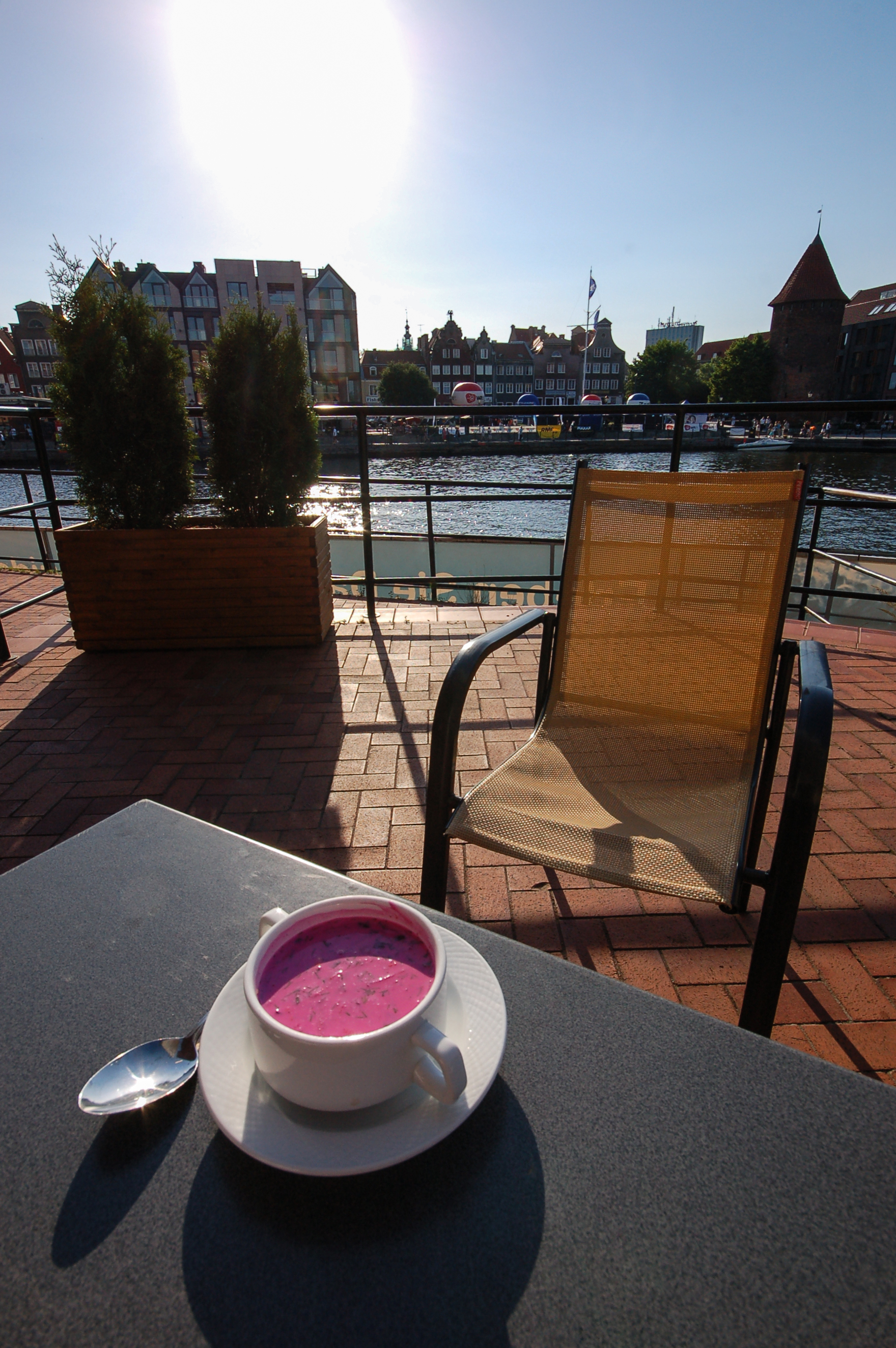 polnischer kalter Borschtsch